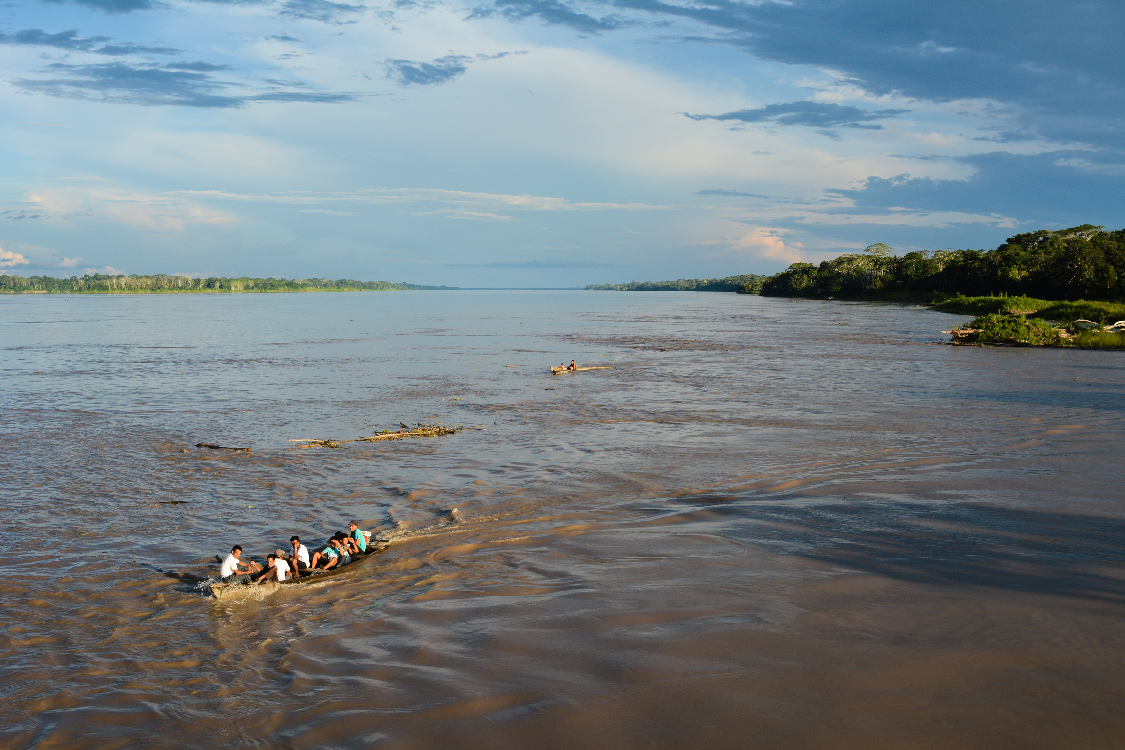 Amazonas, Iquitos - Leticia, Kolumbien